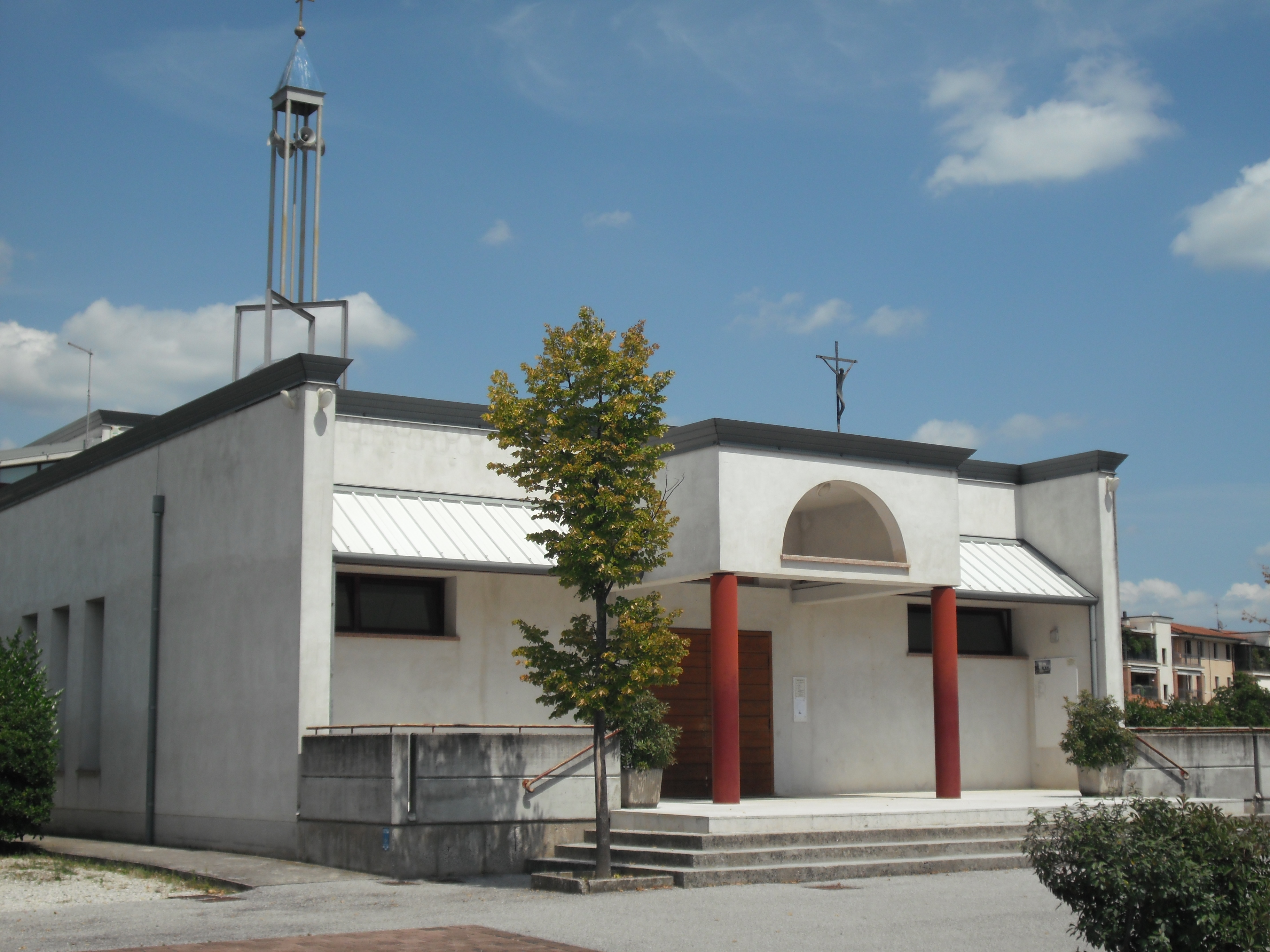 Chiesa parrocchiale di San Marco della Ronzinella - Mogliano Veneto